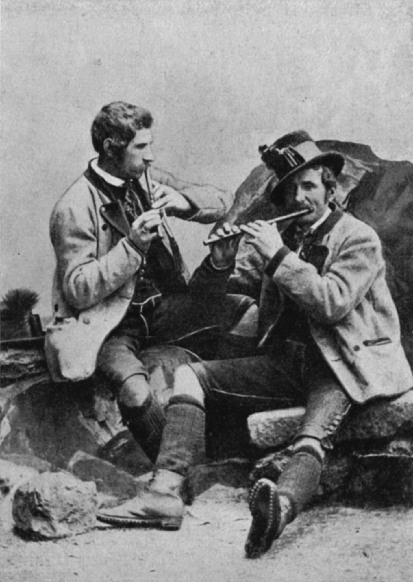 Steirisches Trachtenbuch - Mautner-Geramb 1935 Traditional Costumes from Ennstal, Styria